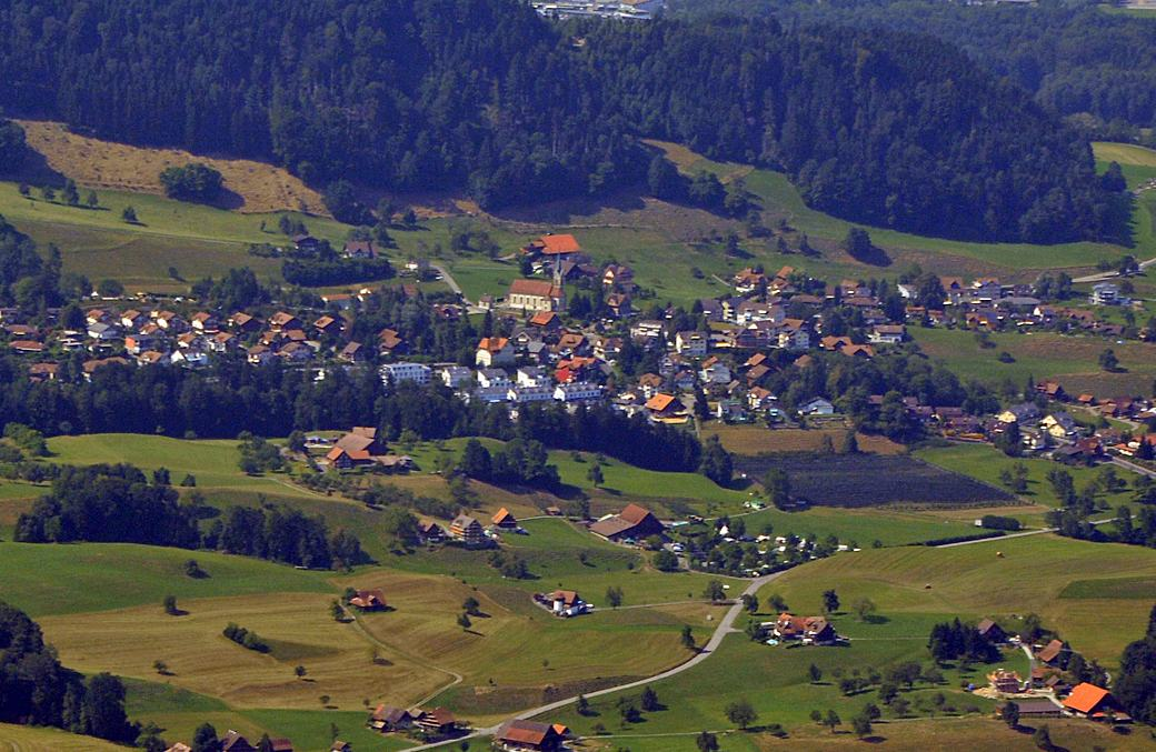 Meierskappel, Ansicht von Rigi Kulm